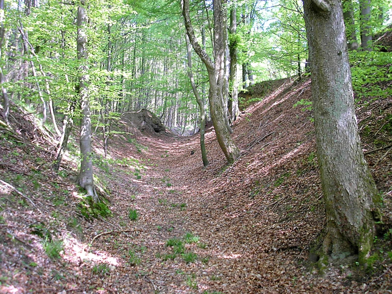 Hochmittelalterlicher Burgstall Hattenberg bei Ried (Markt Dinkelscherben, Landkreis Augsburg, Bayerisch-Schwaben). Der nördliche Grabenbereich der Hauptburg nach Osten. Eigene Aufnahme, Mai 2008 / High Middle Ages Hattenberg castle near Ried (Dinkelscherben, Landkreis Augsburg, Bavaria, Germany). The northern moat of the central castle, looking east. Own photo, May 2008